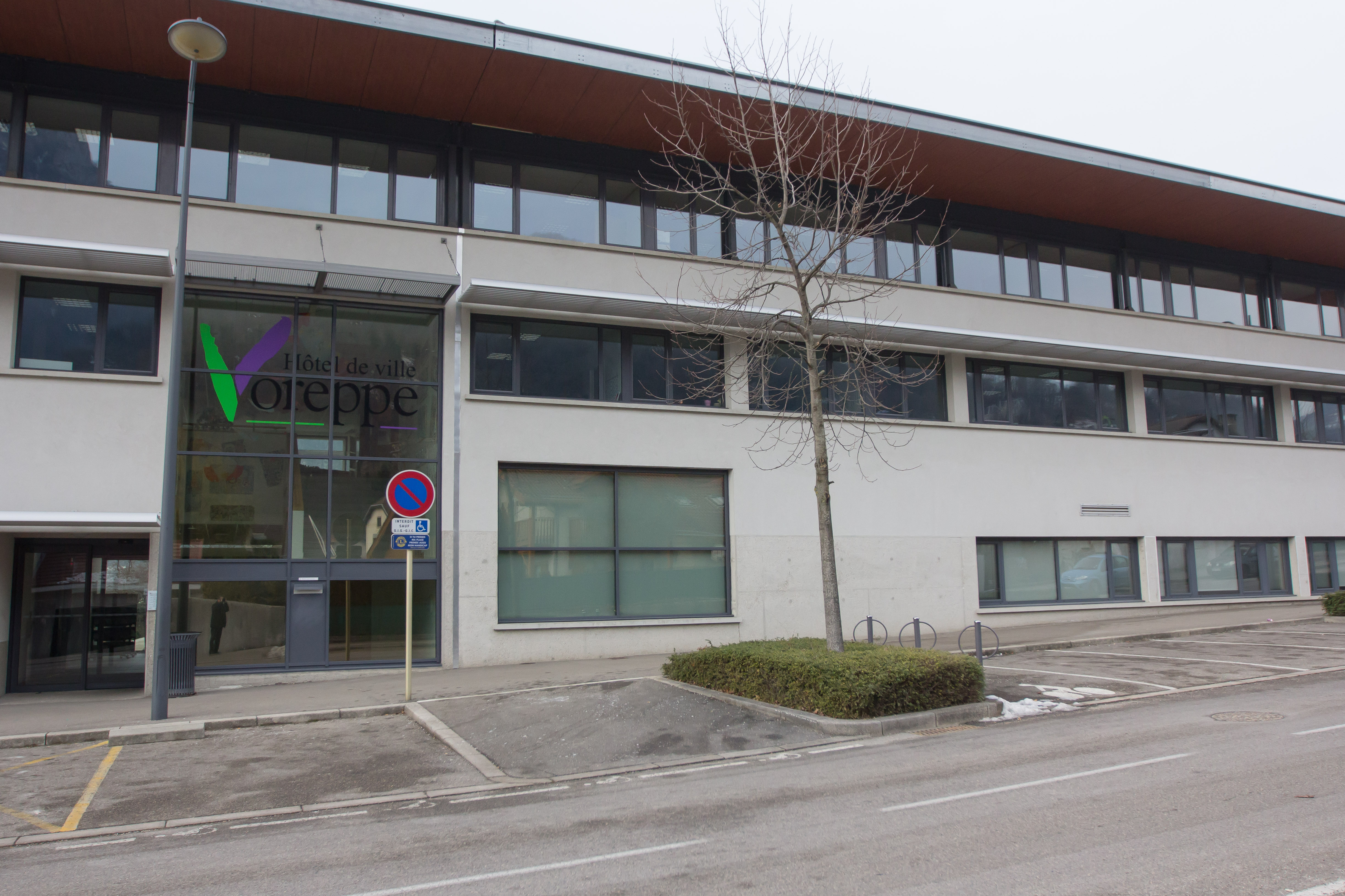 L'hôtel de ville de Voreppe (Voreppe, Isère, France)